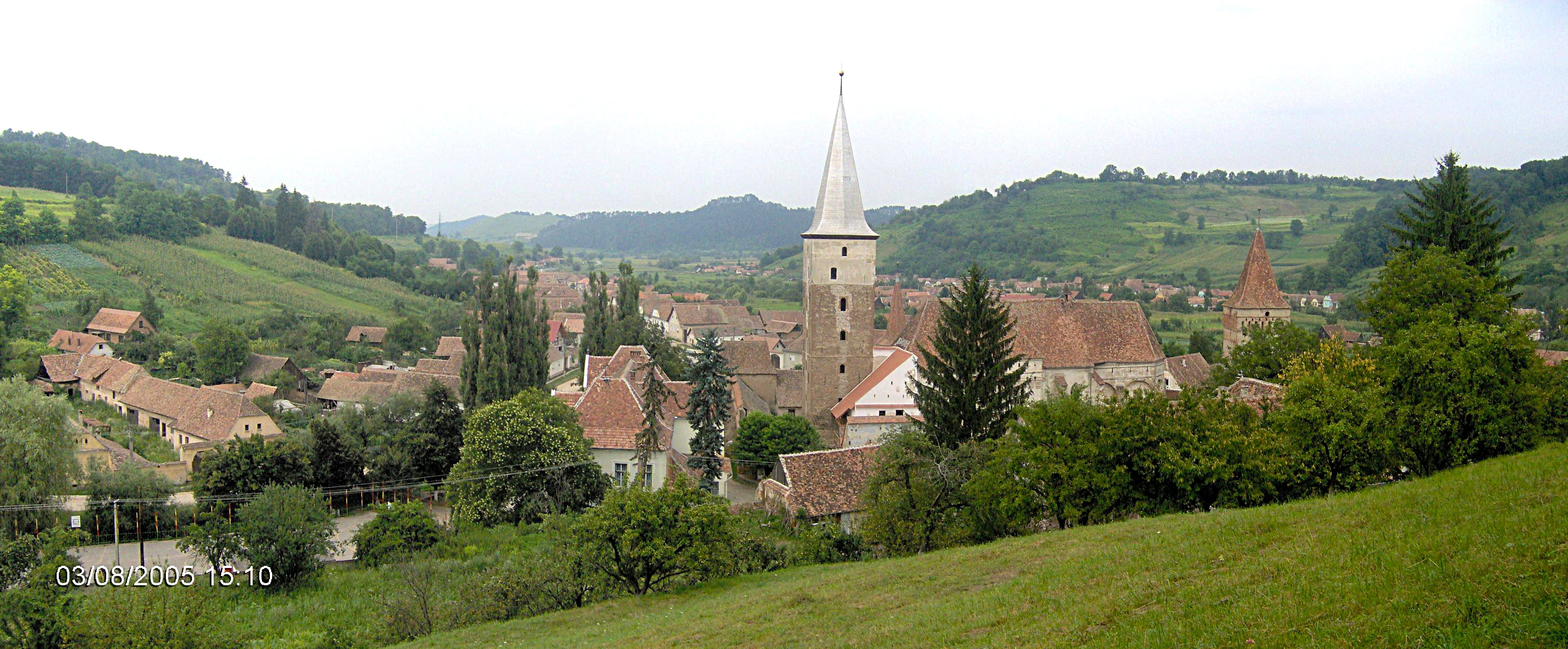 Moşna